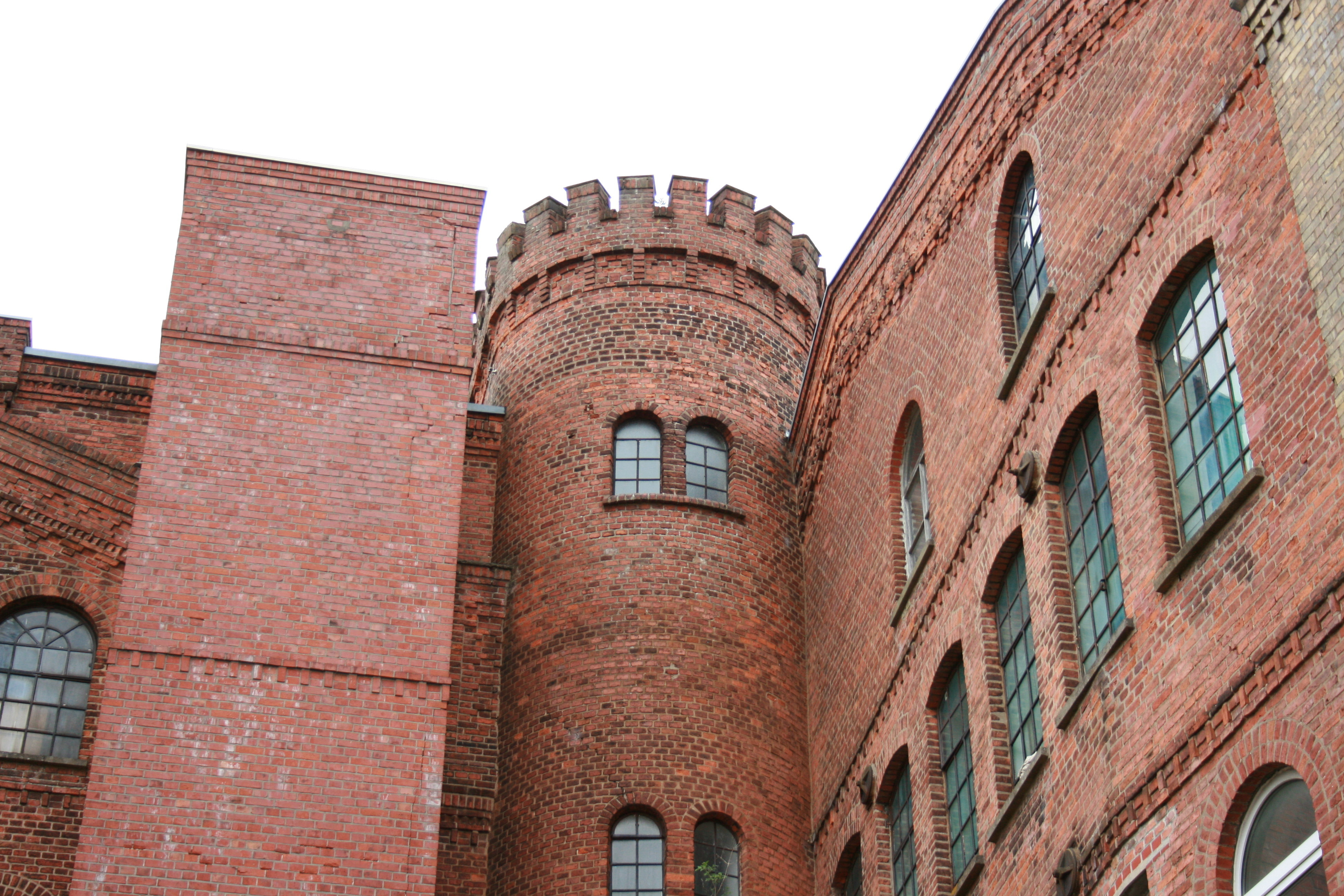 Timmermanngang in Soltau